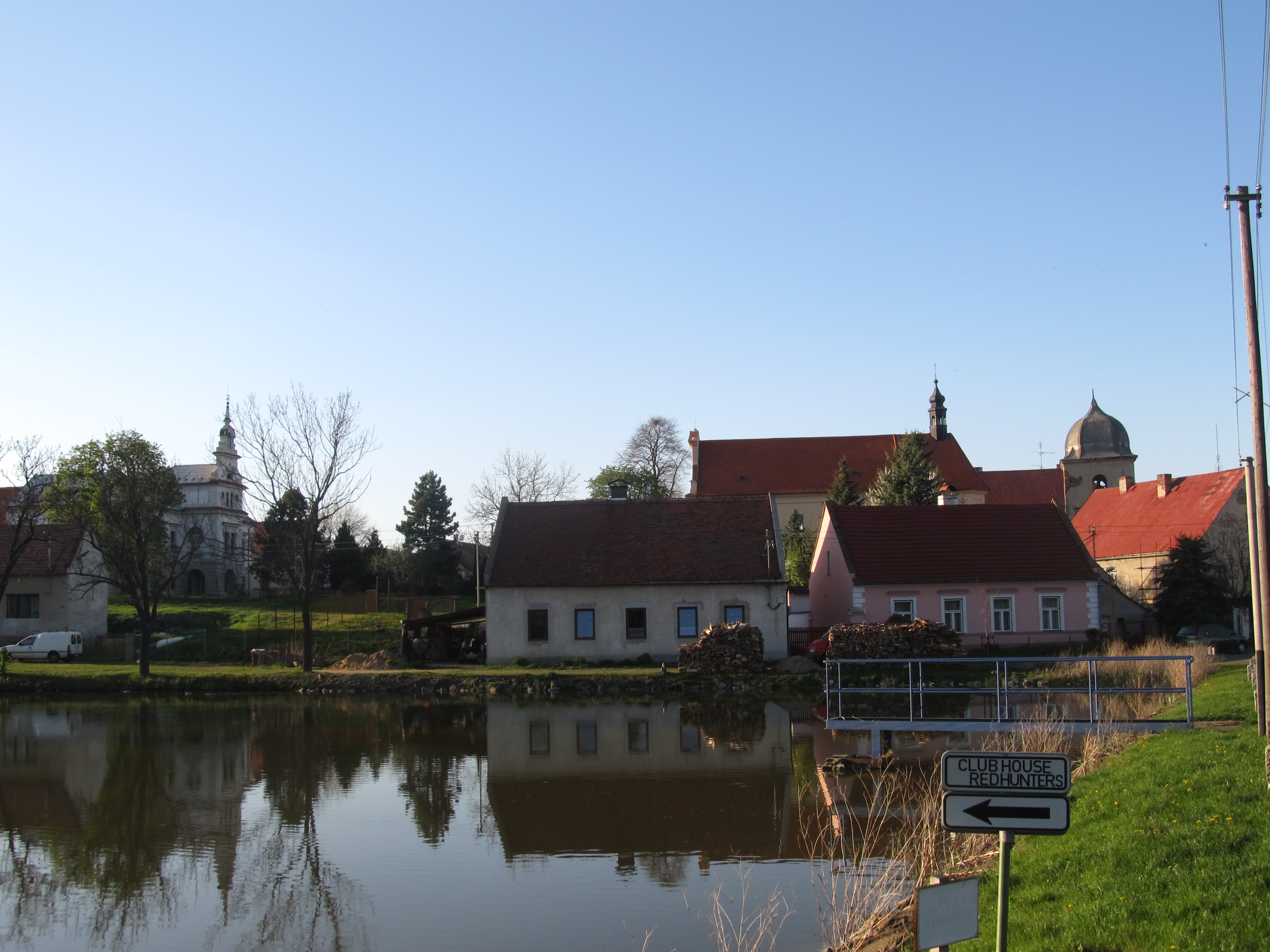 Veliká ves u rybníka